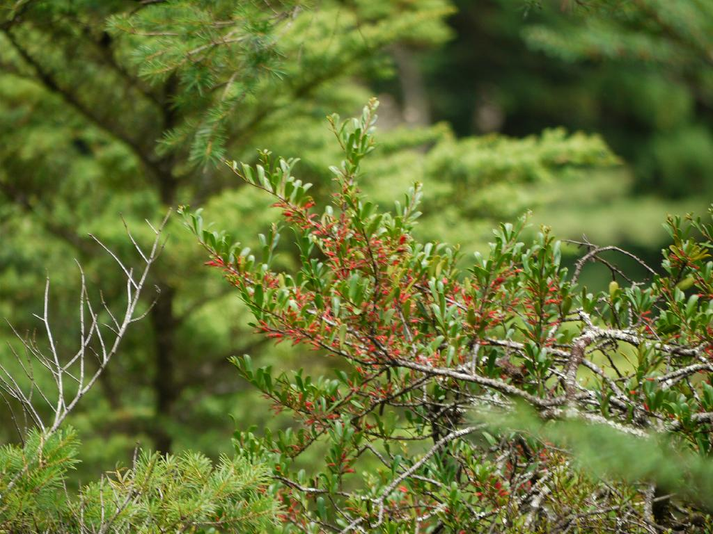 Taxillus kaempferi：マツグミ 2010/08/08 和歌山県北山村：Kitayama V. Wakayama pref. Japan